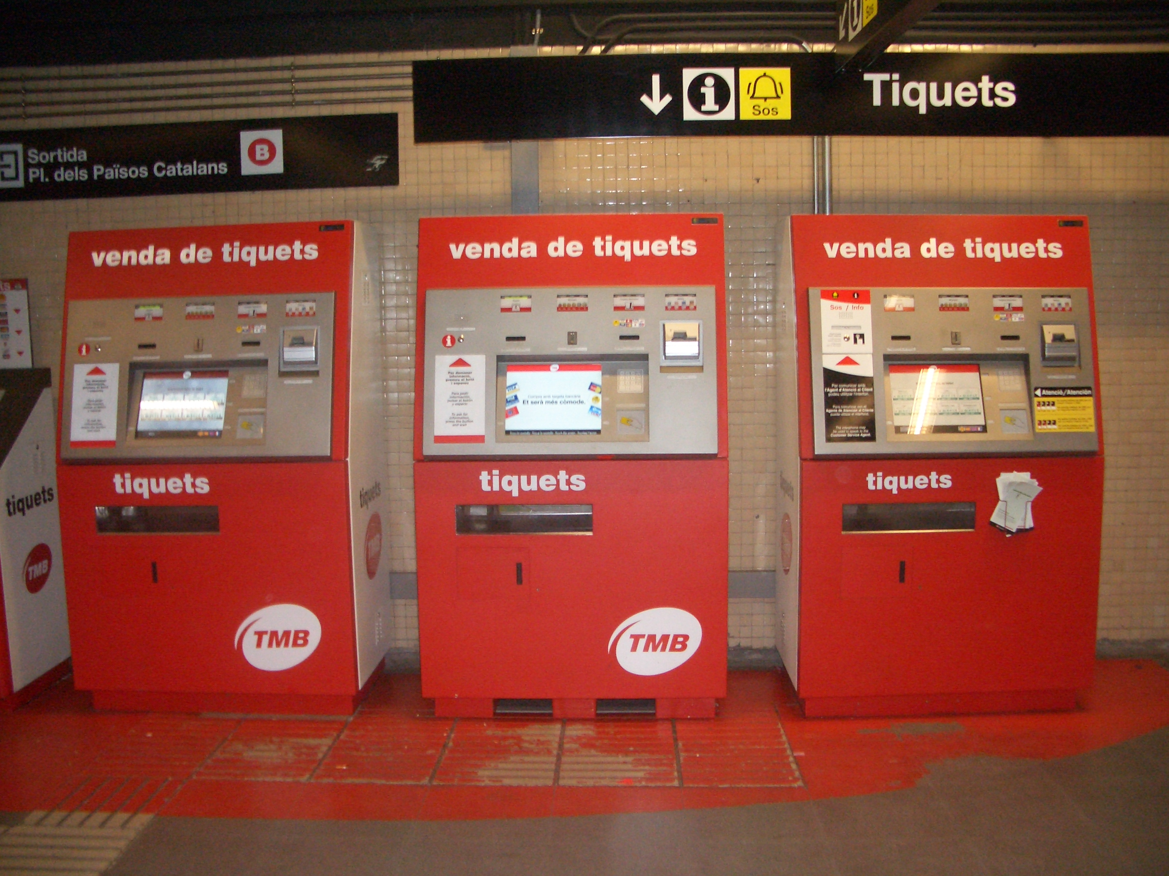 Venta automatica del metro de Barcelona,España.